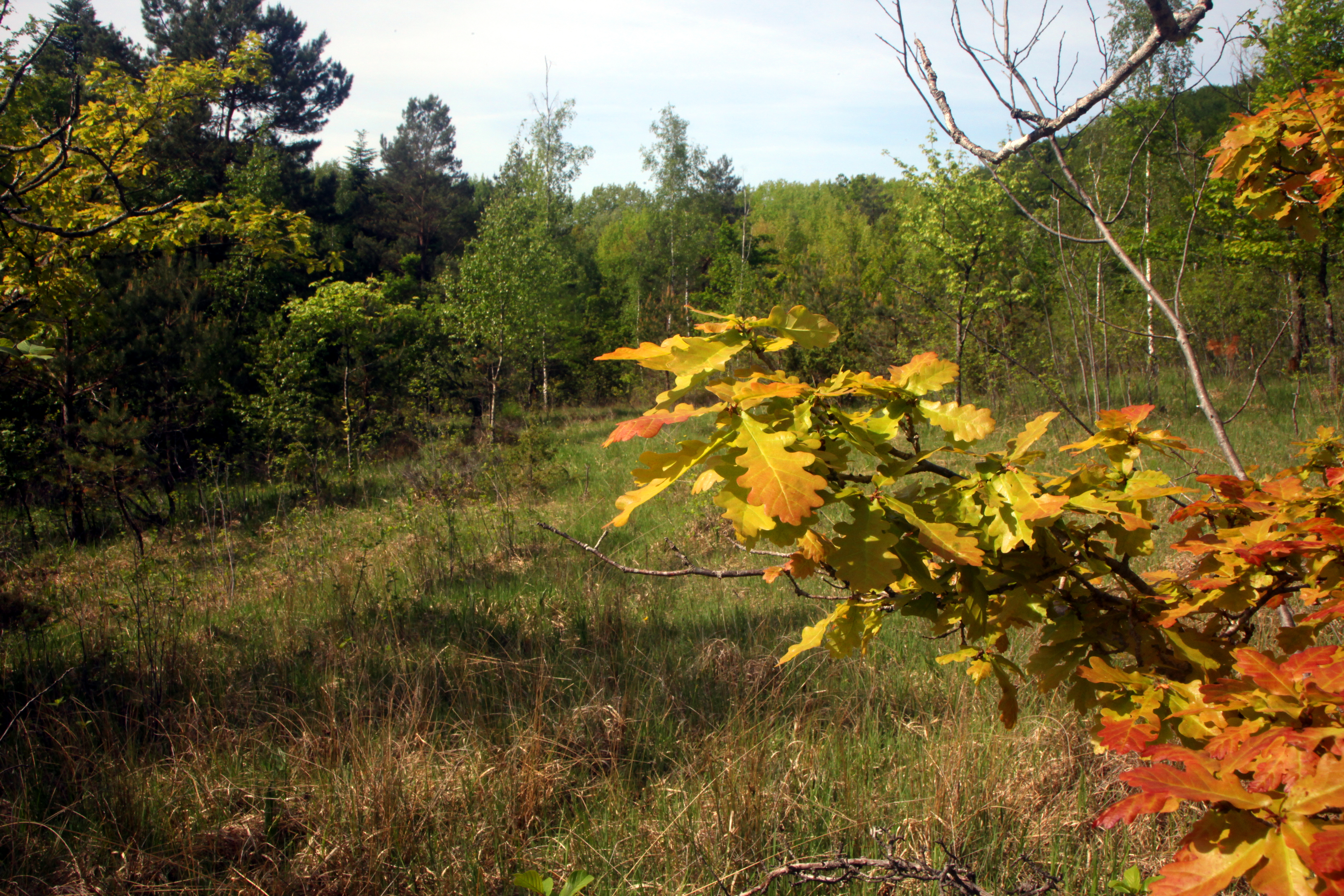 Un chêne se développe dans la zone humide de pente du vallon de Fontenelay.